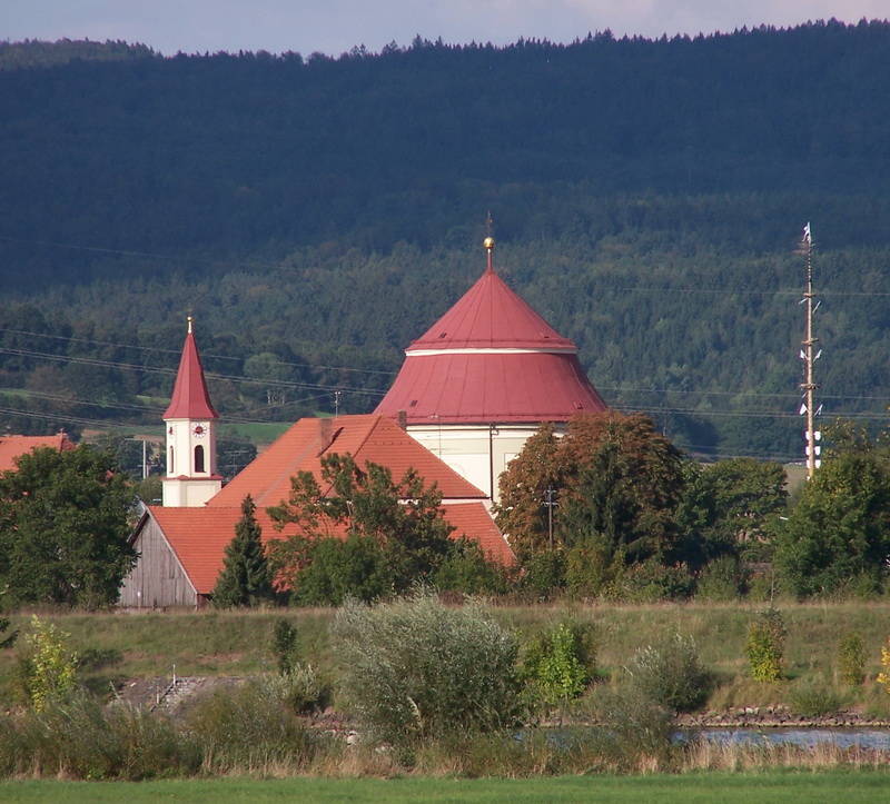 Kath. Wallfahrtskirche Hl. Blut in Niederachdorf. Die Kirche besteht aus einer hohen Rotunde aus dem Jahre 1700 und der ursprünglichen romanischen Kapelle, die westlich anschließt. Die wertvolle barocke Einrichtung wurde leider im 19. Jahrhundert durch neuromanische Altäre ersetzt.